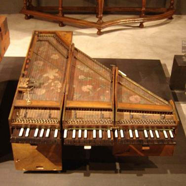 "Clavecin brisé" par Marius - Paris, Musée de la Musique.